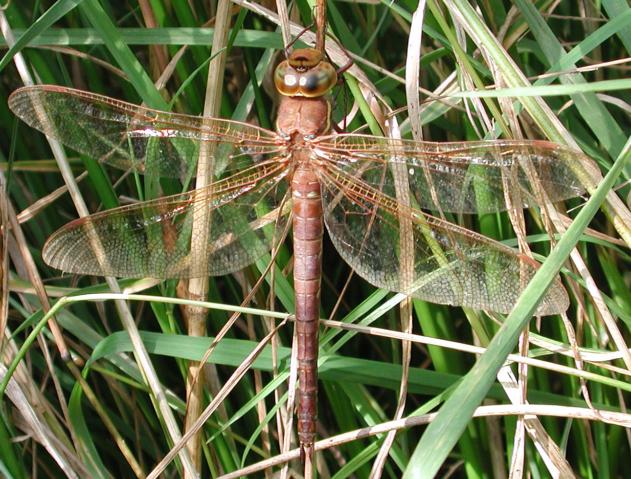 Aeshna grandis, f., Braune Mosaikfungfer, Weibchen, NSG Kirchwerder Wiesen, Elbmarsch bei Hamburg, Germany